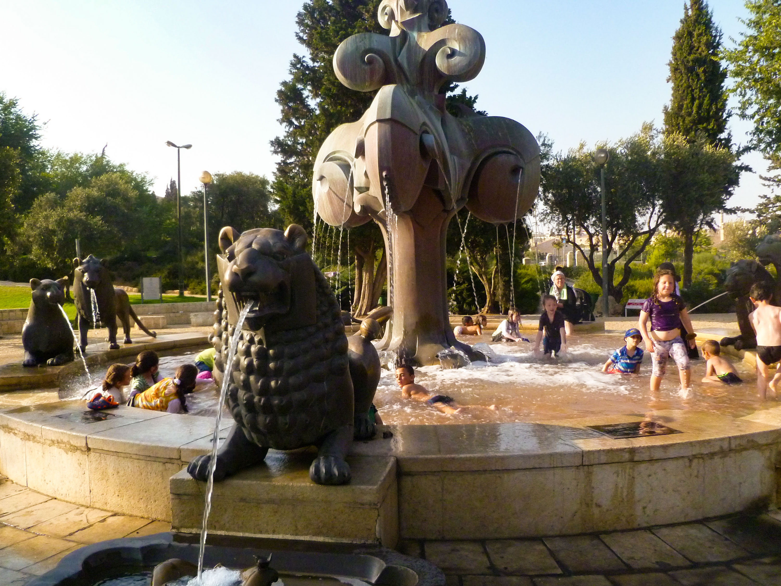 מזרקת האריות במשכנות שאננים. מזרקה ופסל בגן בלומפילד שבירושלים. המזרקה תוכננה על ידי האמן הגרמני גרנות ראמפף. היא הוצבה בכוונה במקום המקשר בין האוכלוסייה היהודית והערבית בעיר וכן בין העיר העתיקה והחדשה. המזרקה הוקמה בשנת 1989, בעת הקמתה הייתה המזרקה הראשונה בירושלים